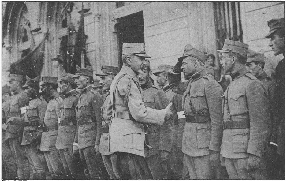 1917 - Generalul Prezan întâmpină voluntarii ardeleni - gara Iaşi Imaginea poate fi folosită fără restricţii nefiind protejată de drepturi de autor la data publicării